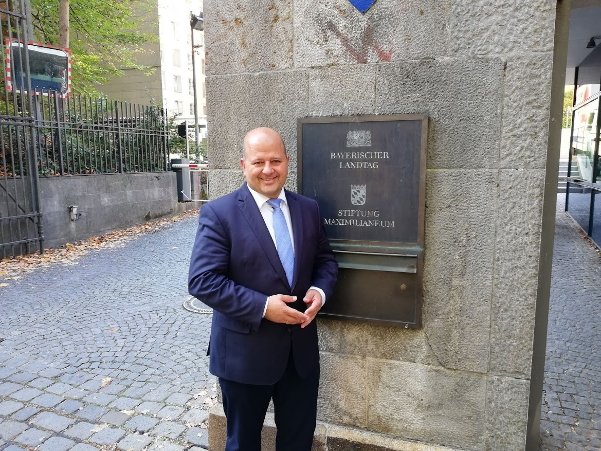 MdL Holger Dremel am Maximilianeum